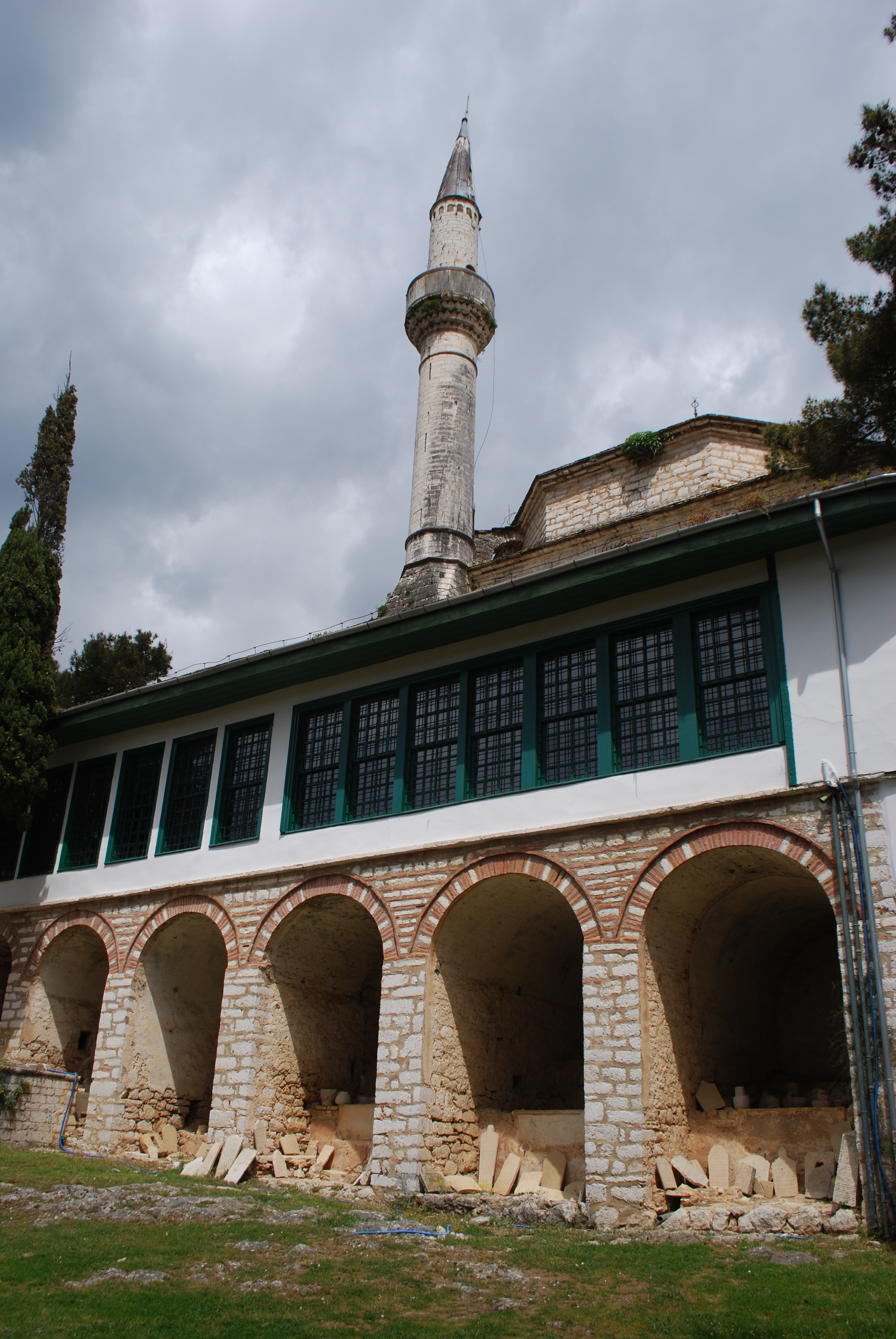 Vue de Ioannina.